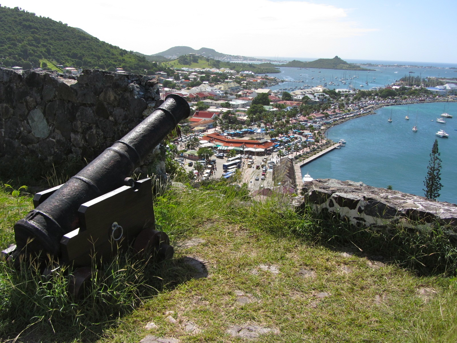 Cannon Over Marigot Market